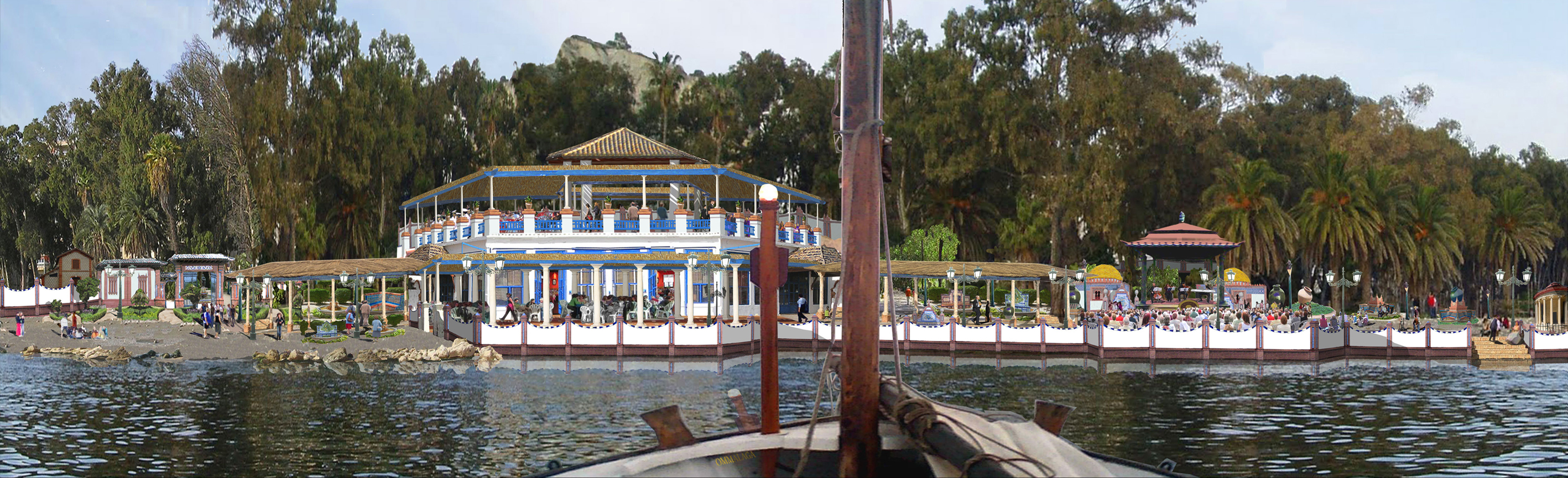 Reconstrucción digital aproximada del balneario del Carmen a partir de elementos que han perdurado o son fácilmente recuperables (por Ortiz Morales, J.M; Dr. en Com.Aud./UMA, año 2011/@Ommalaga)